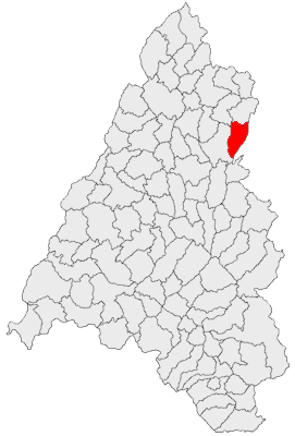 Categorie:Hărţi ale judeţului Bihor